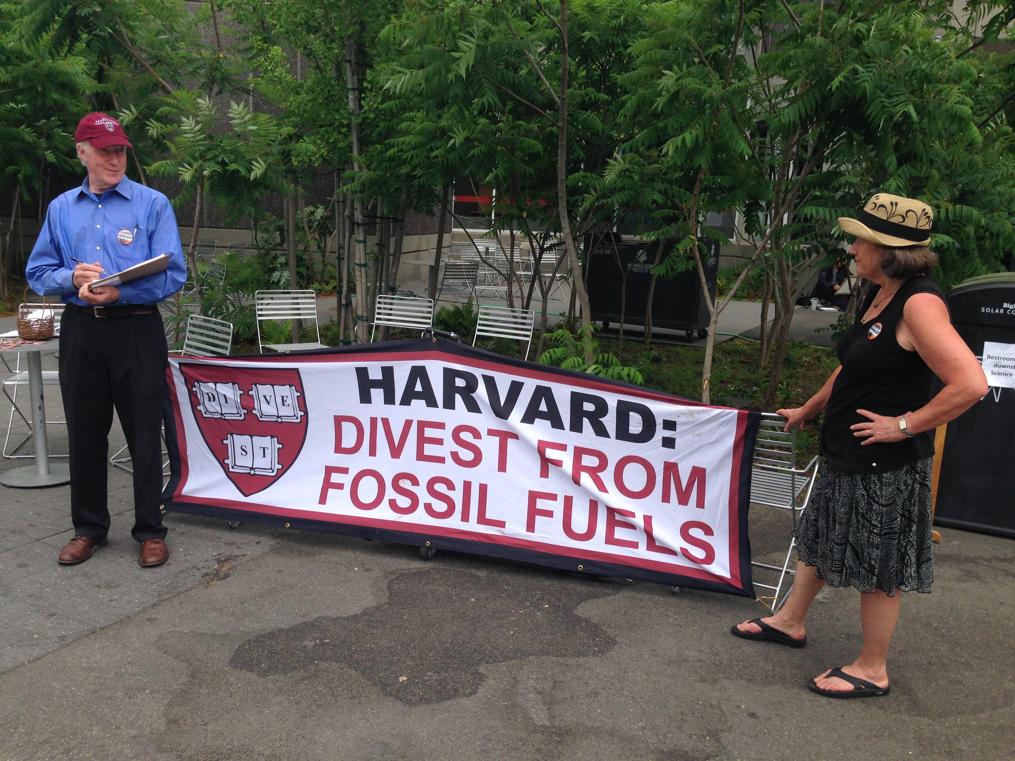 Harvard fossil fuel divestment petition